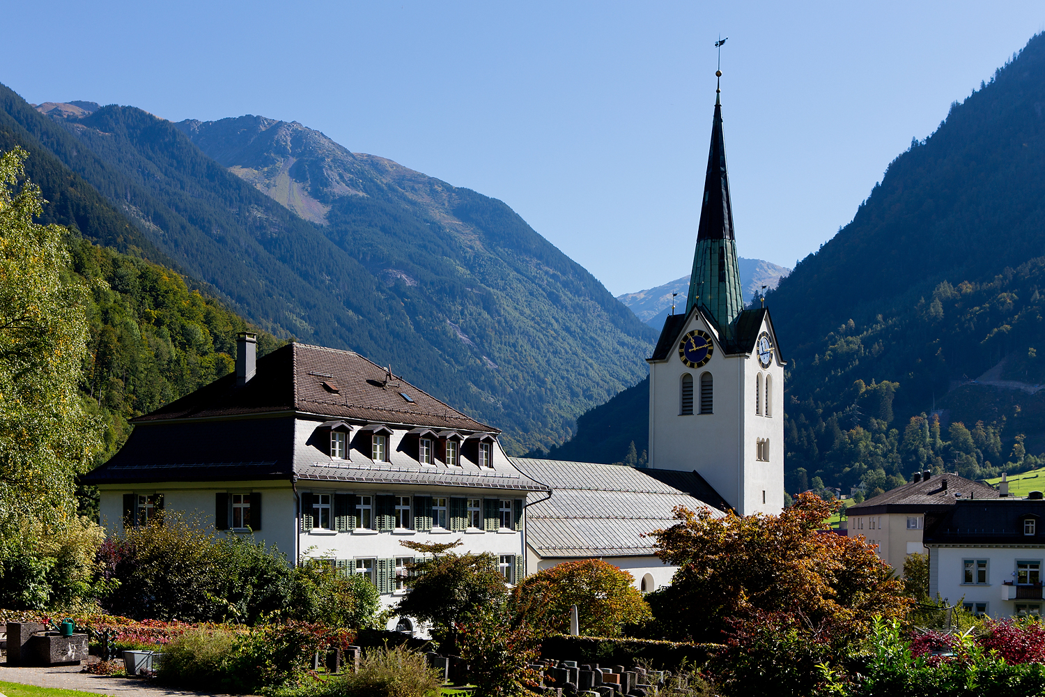 Das reformierte Pfarrhaus (Blumerhaus VI) und die reformierte Kirche in Schwanden GL